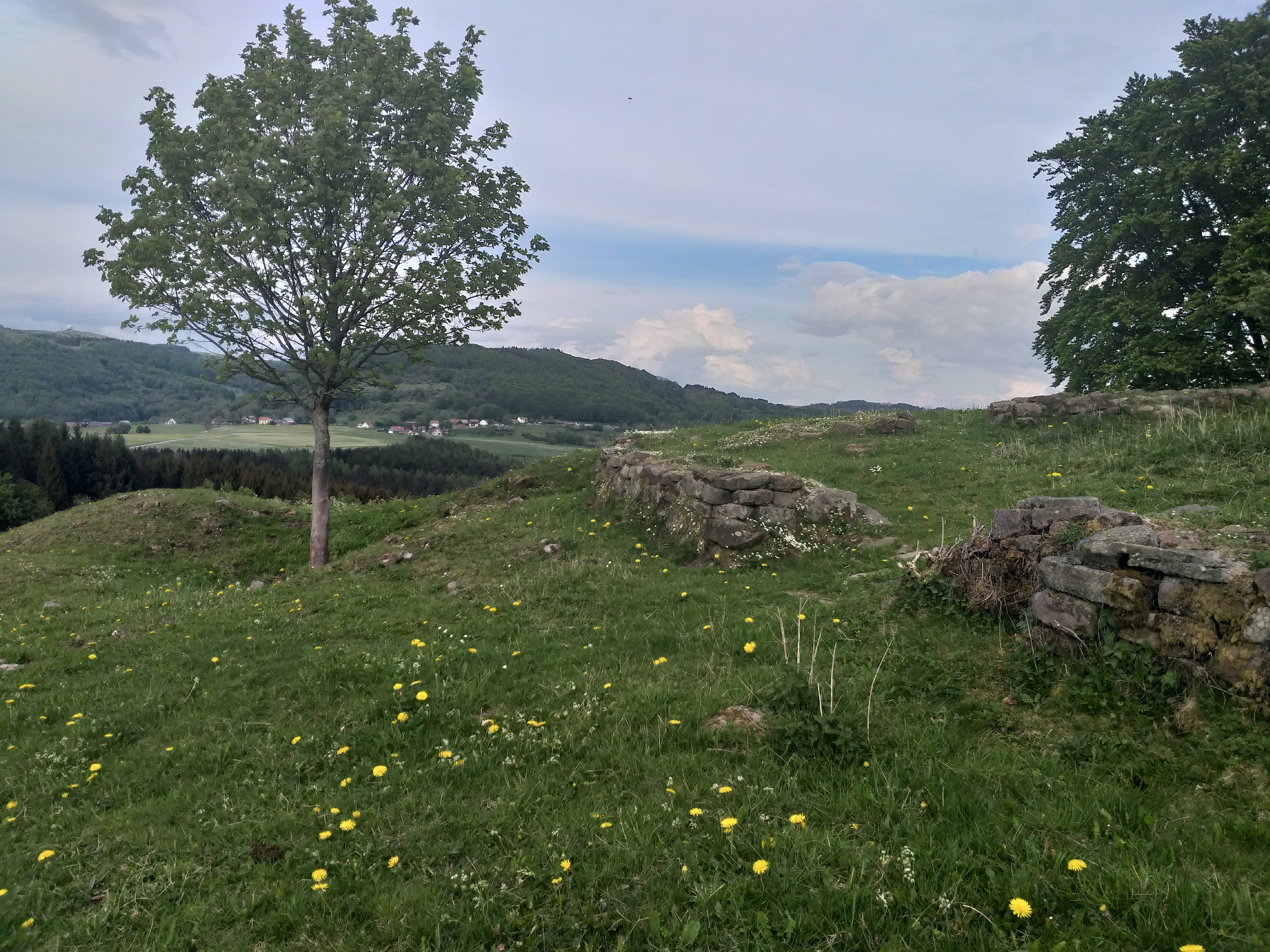 Wachtküppel mit Anlagenresten